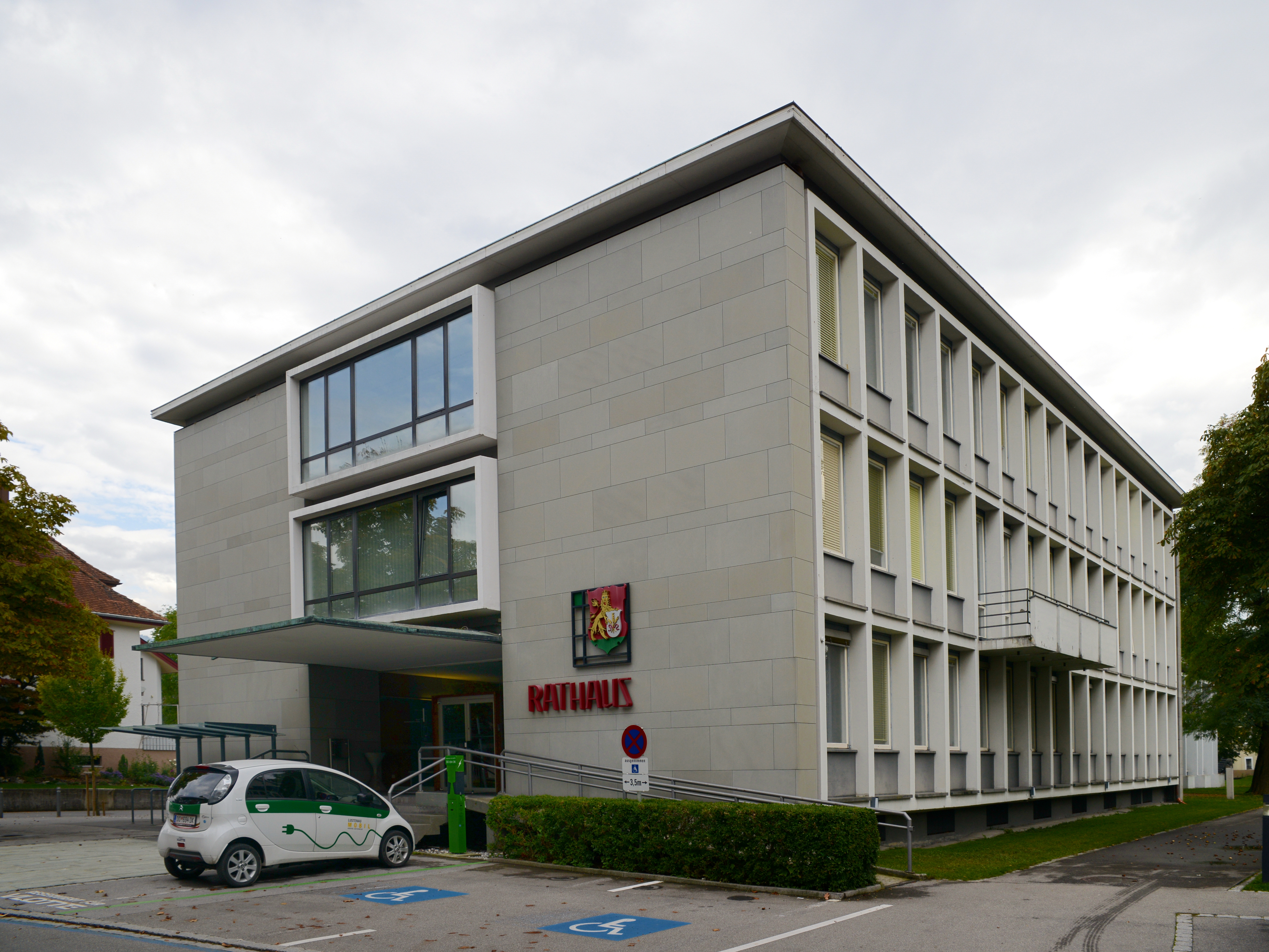 Rathausstraße Nr.1 Rathaus in Lustenau; Info Das Objekt steht unter Denkmalschutz.